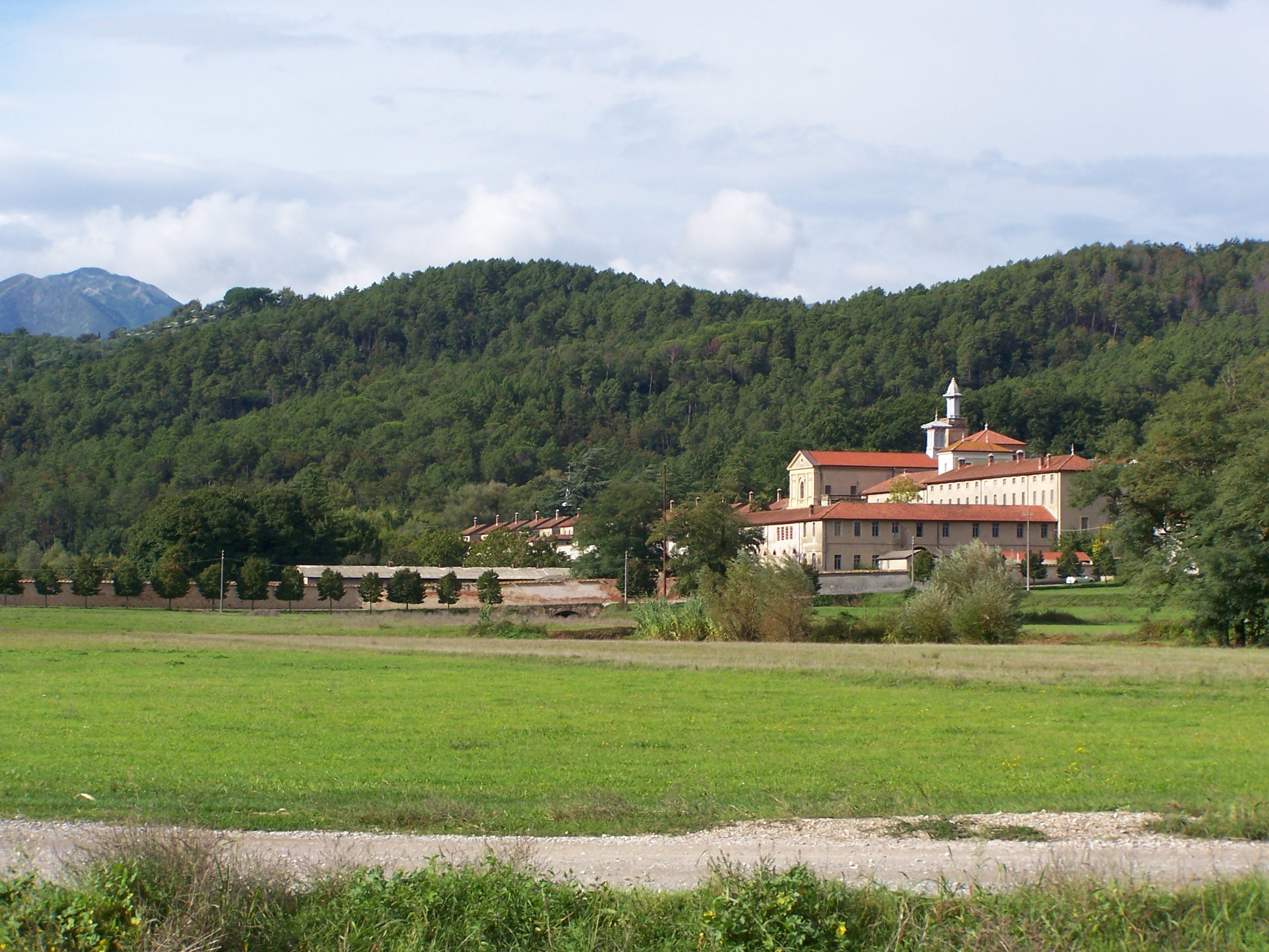 Kartuzja w Farneta we Włoszech (widok od południa). Autorem zdjęcia jest Certosino.